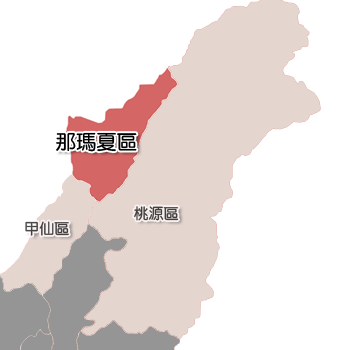 那瑪夏區相對位置